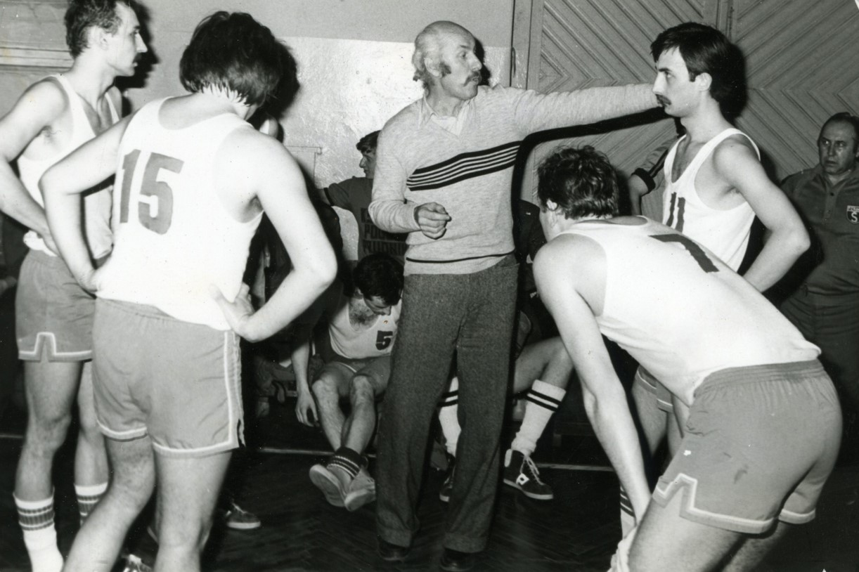 Trener Włodzimierz Kuśmierczyk przekazuje swoje trenerskie uwagi. Na zdjęciu Janusz Łukasik, Zygmunt Wójcik, Władysław Kuśmierczyk, Zbigniew Adamów. Włodzimierz Kuśmierczyk był wybitnym zawodnikiem Stali Ostrów Wielkopolski. Jako trener Pogoni Prudnik wprowadził drużynę po raz kolejny do II ligi.